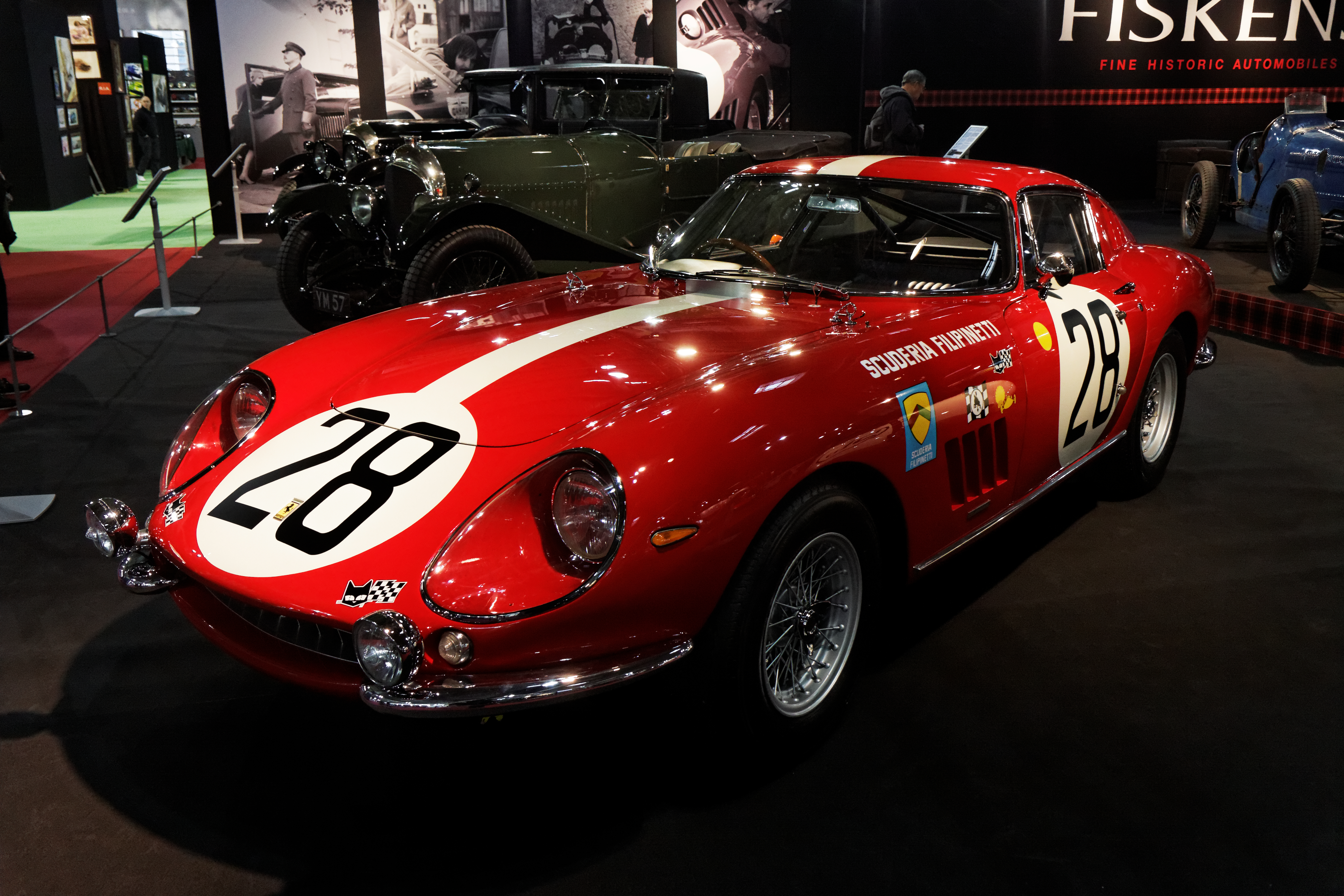 Une Ferrari 275 GTB C présentée lors du salon Retromobile 2013.